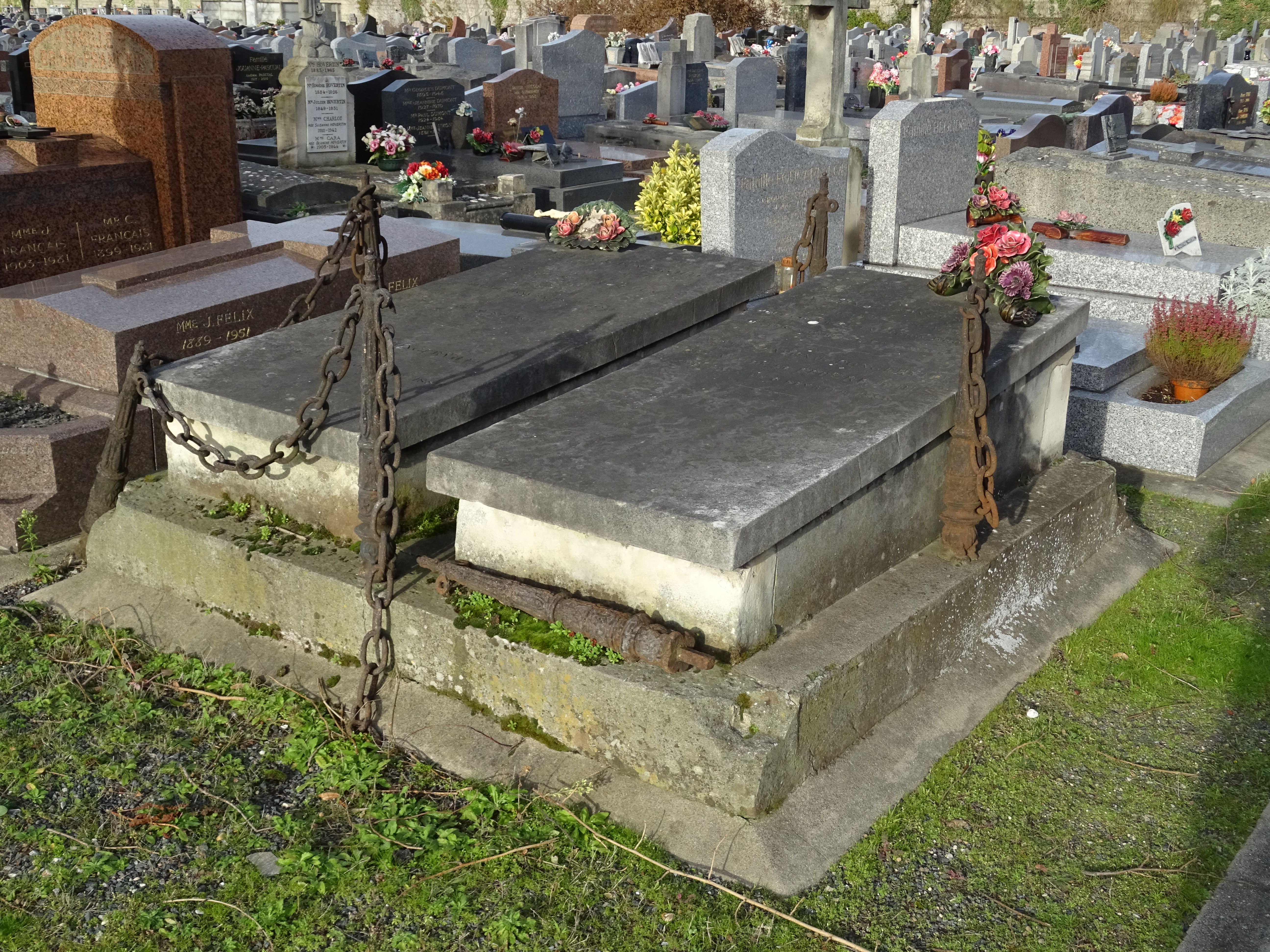 Monument funéraire de Sanson de Pongerville Jean Baptiste Antoine 1782 1870 académicien, maire de Nanterre de 1832 à 1839